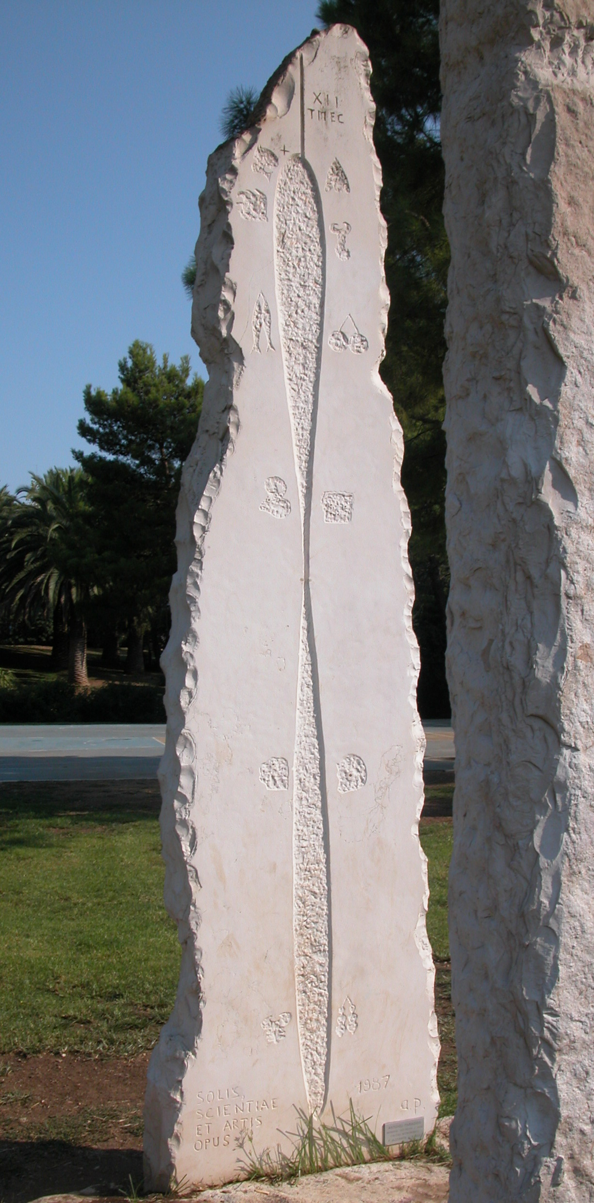 La grande meridiana di Bari, situata nel Parco Largo 2 giugno, opera scultorea di Antonio Paradiso su progetto di Antonio Rini e Francesco Azzarita dell'Associazione Barese Astrofili, fotografata il 18 settembre 2011